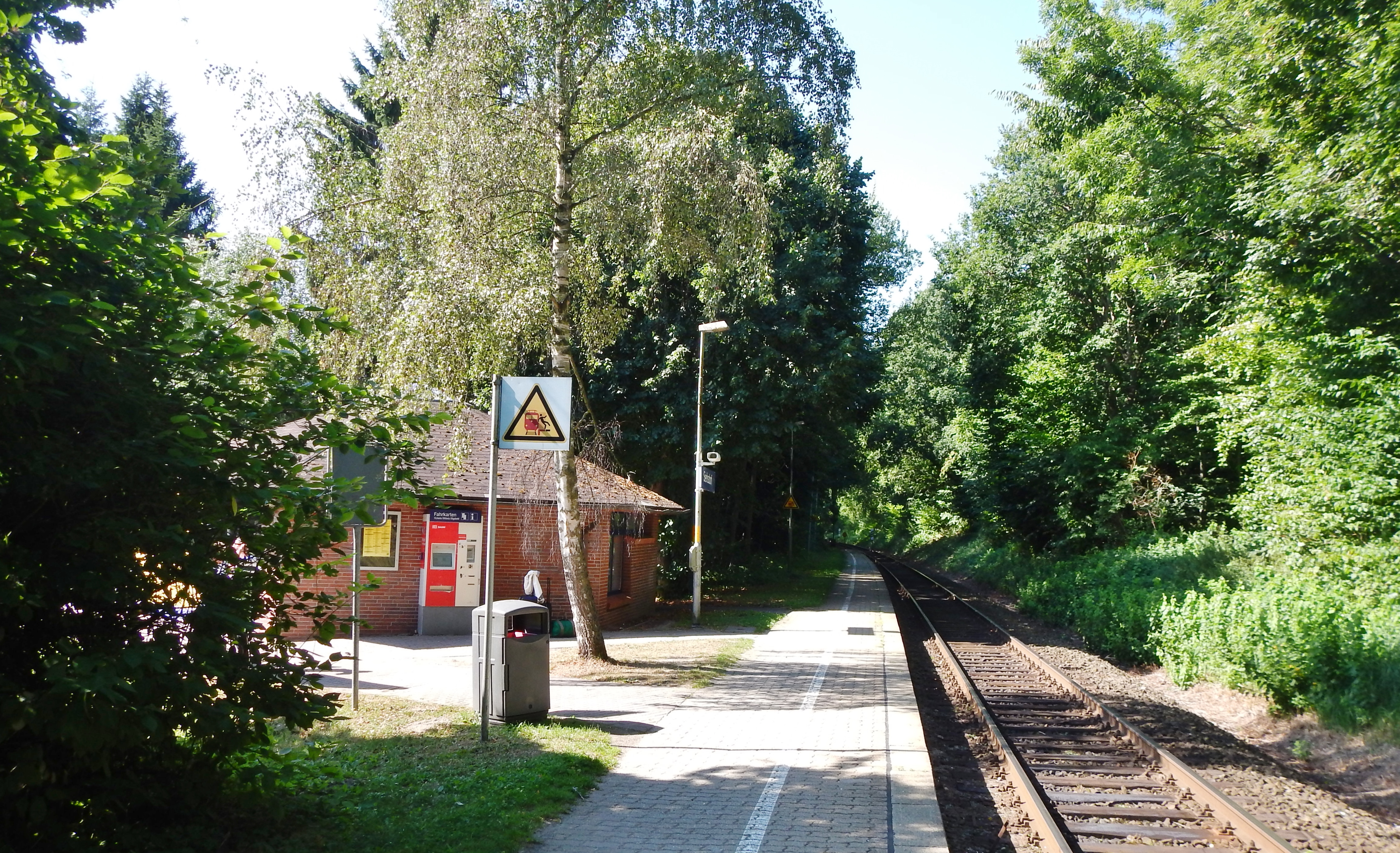 Bahnhof Sierksdorf